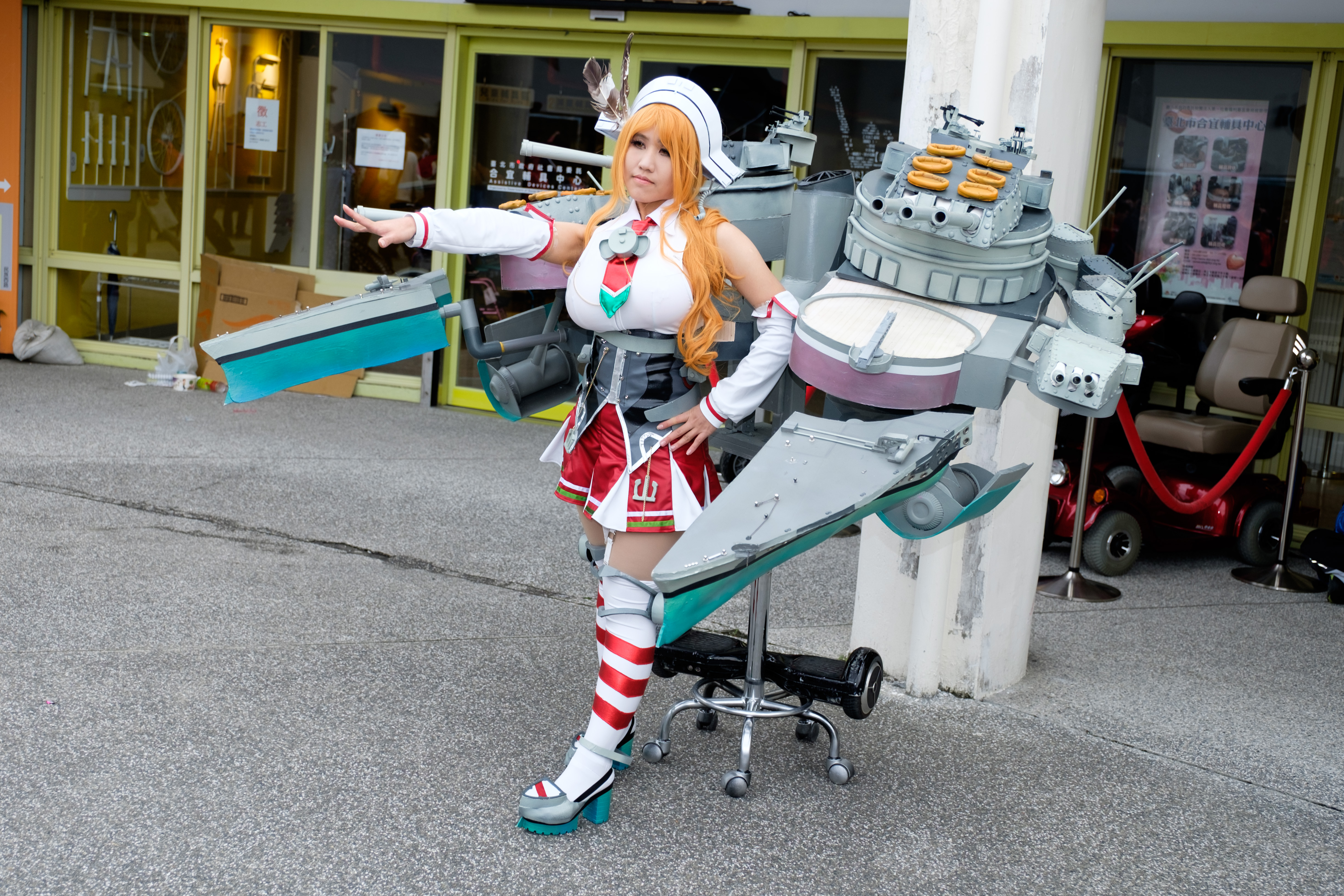 Fancy Frontier 27第一日下午，＜艦これ＞義大利戰艦利托里奧艦娘cosplayer左前方。